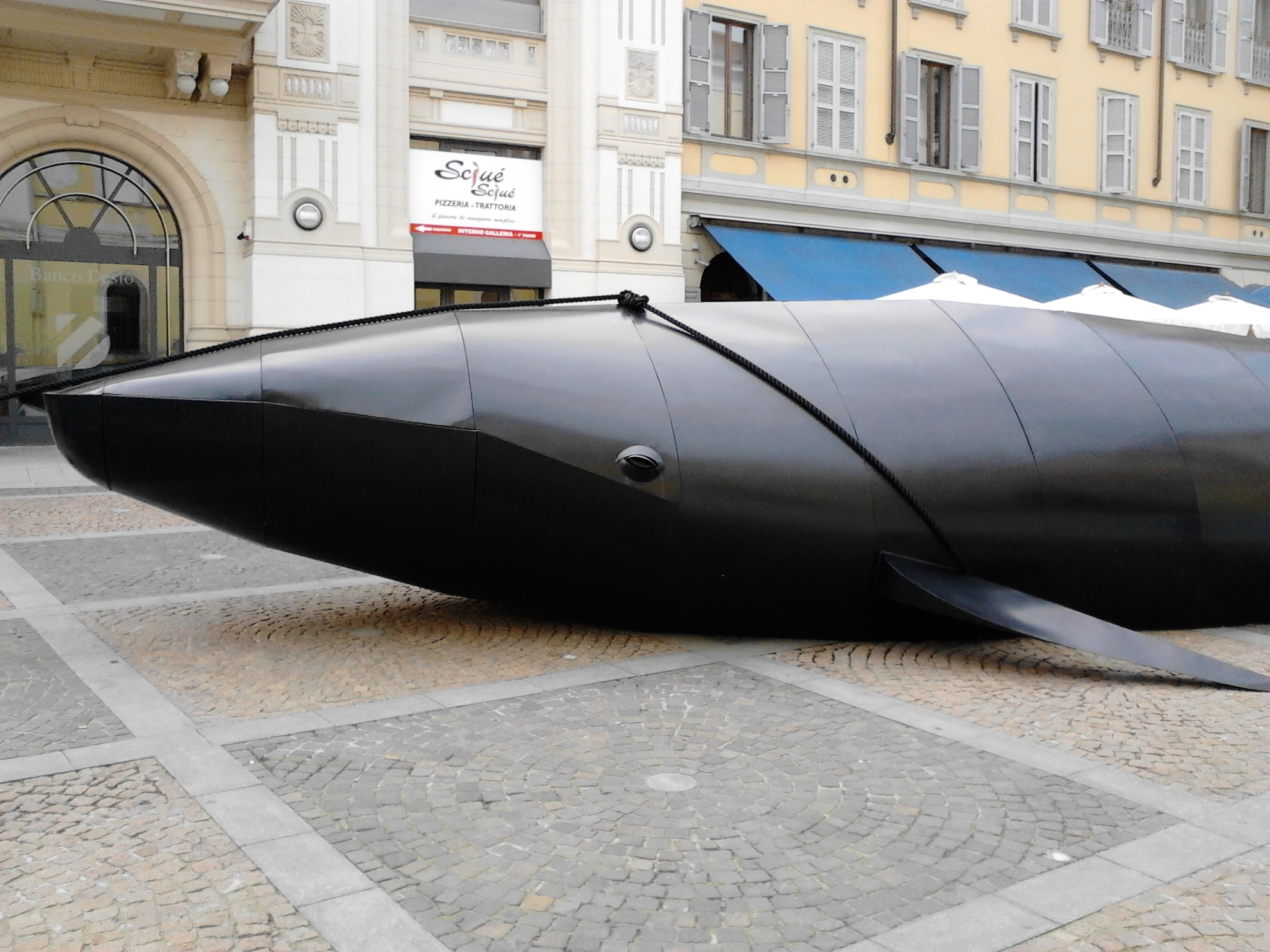 Gaia e la Balena a Monza - ITALIA